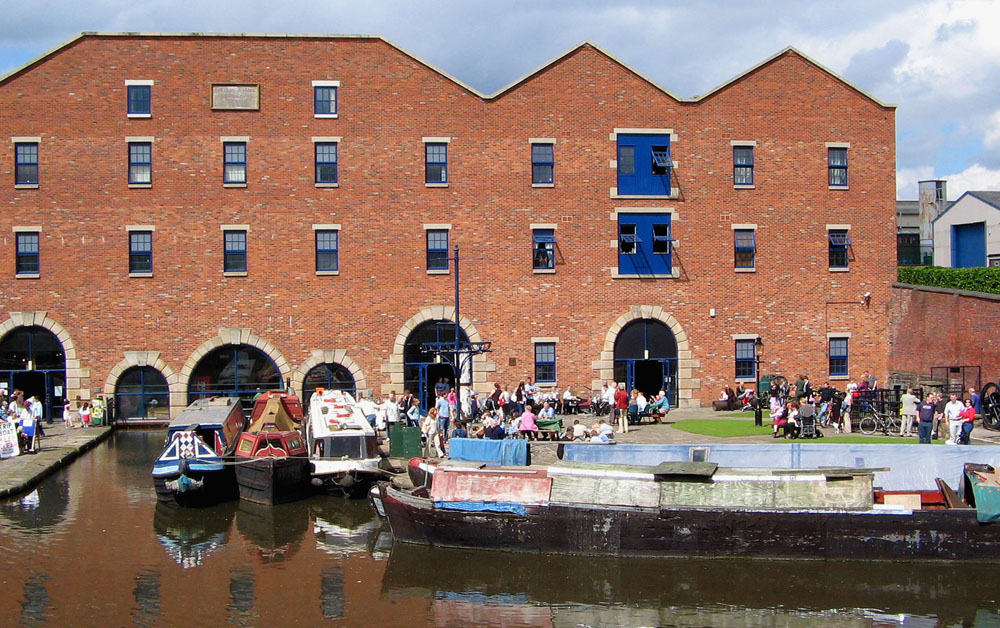 Portland Basin in Ashton-under-Lyne